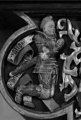 Sten Sture 1516. Västerås domkirke.